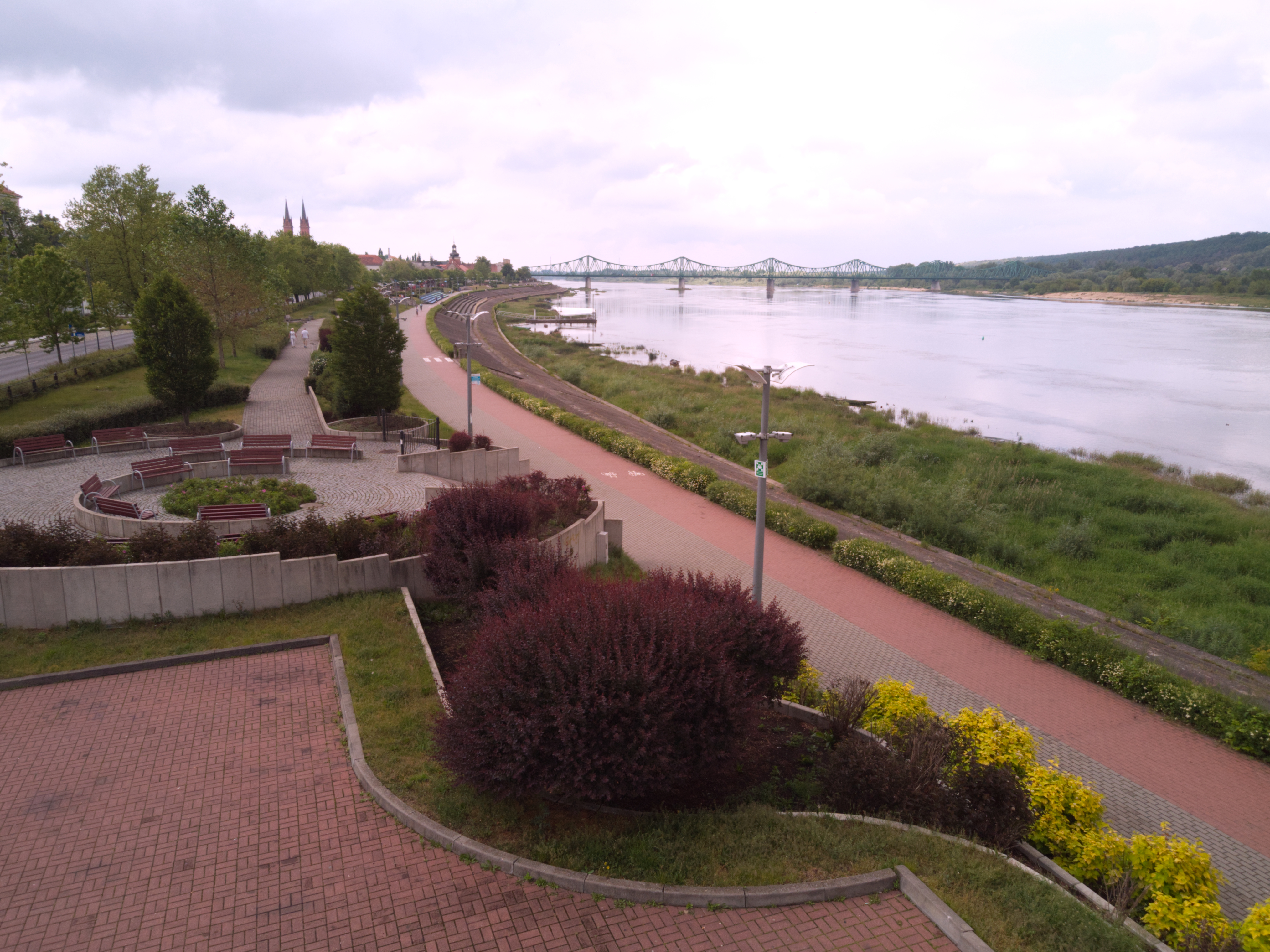 bulwary (2020 r.)